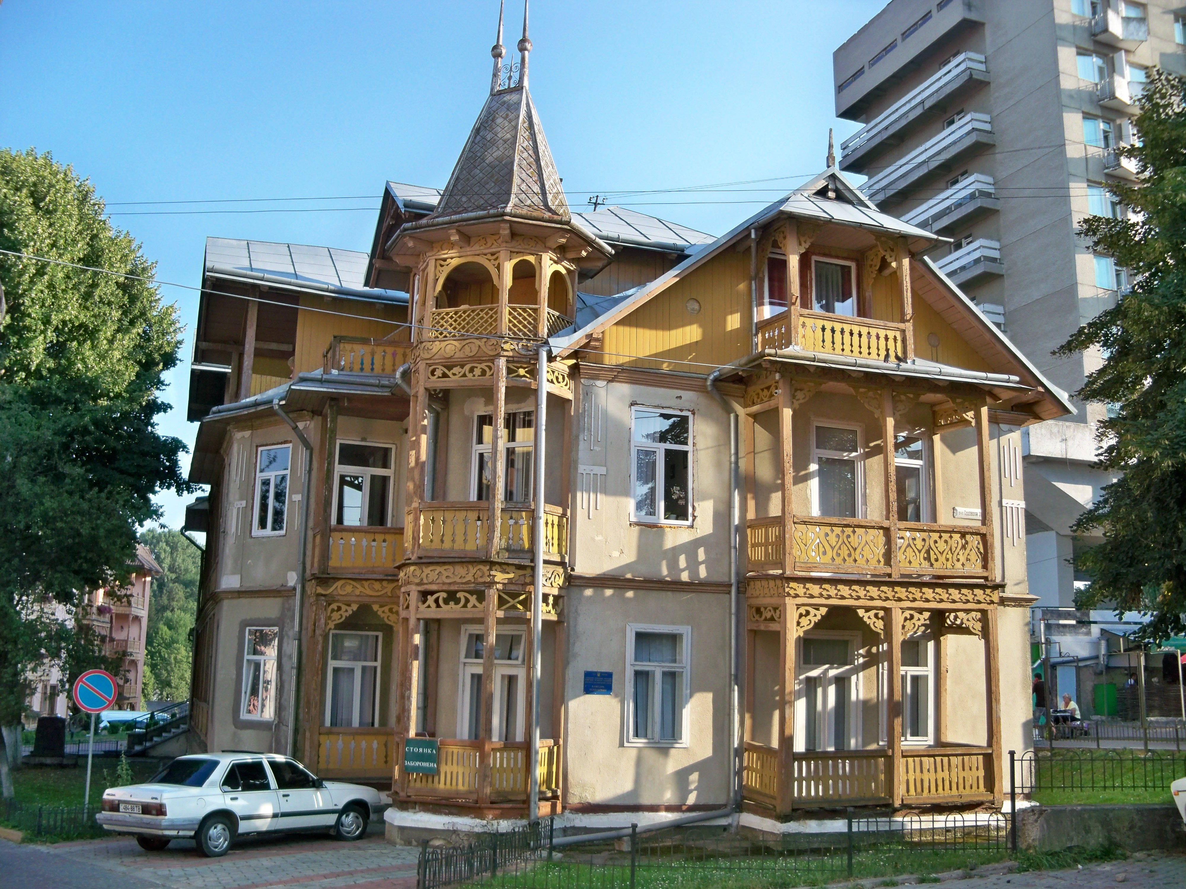 Вілла «Олімпія» (зміш.), Трускавець, вул. Суховоля, 31